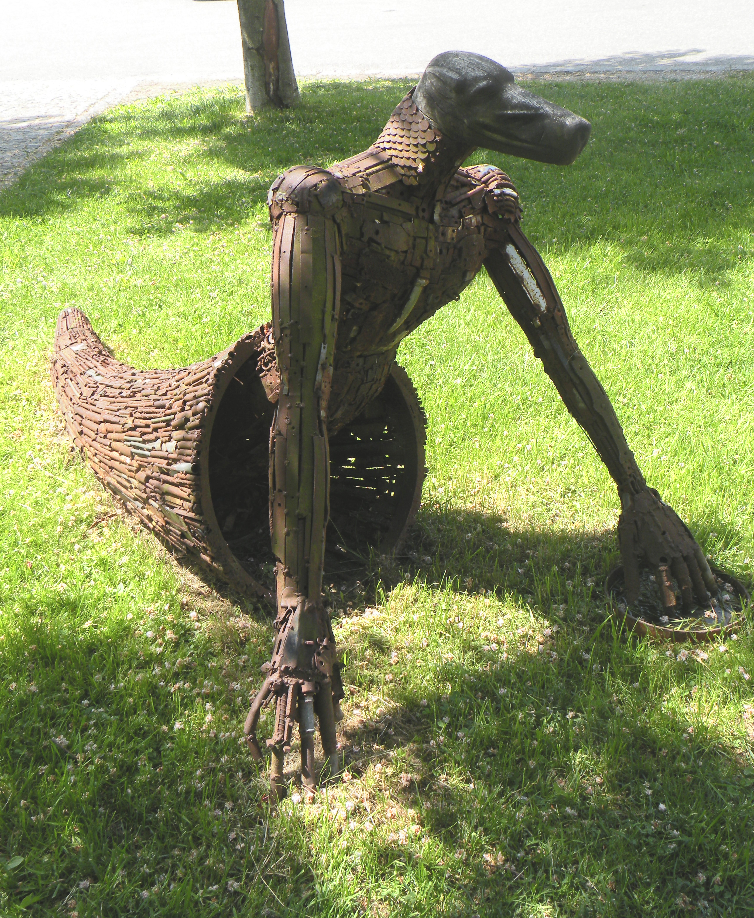 Уличная скульптура в городке Арнбрук (Баварский лес)